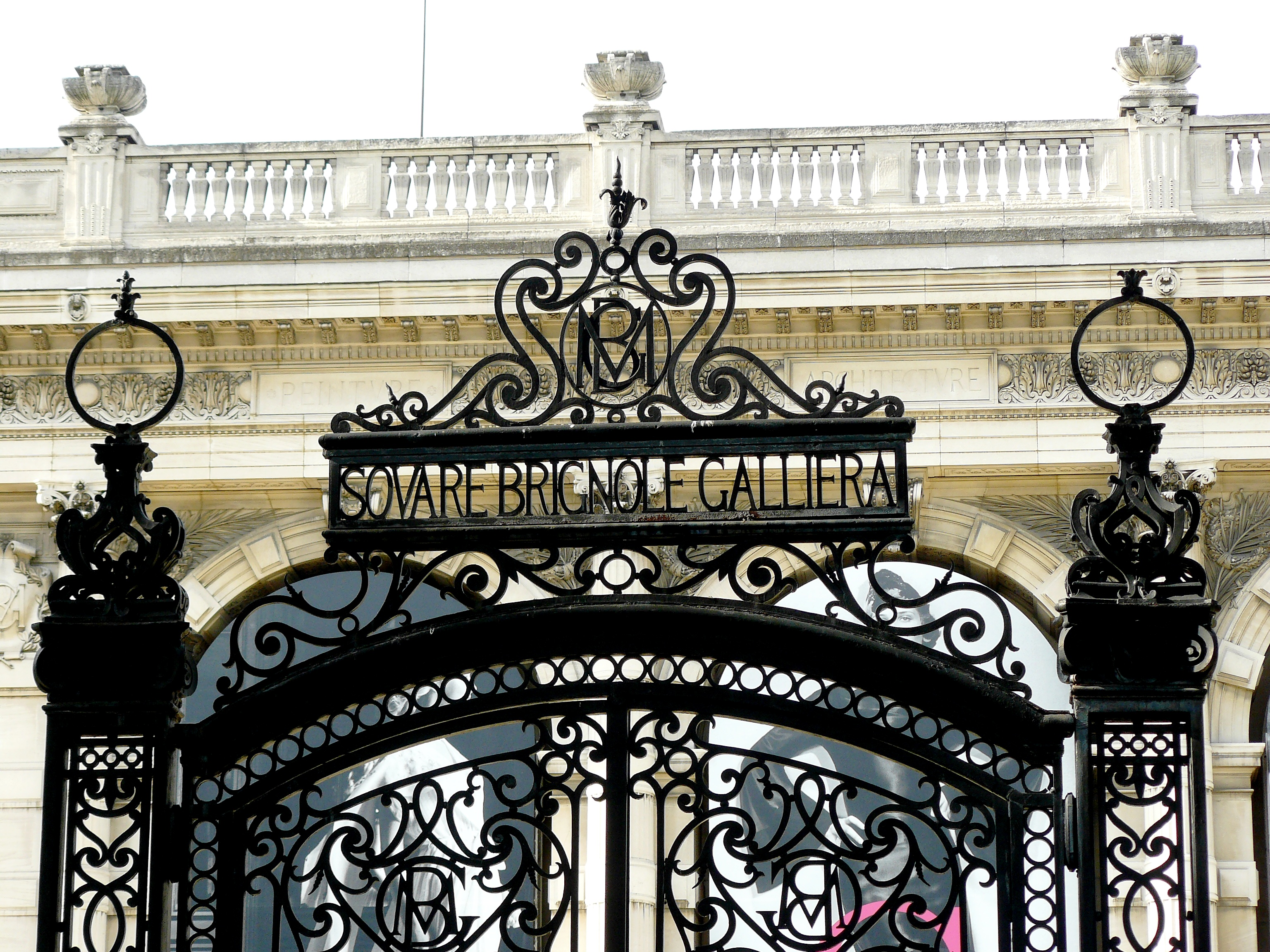 Grille du square Brignole Galliera, place de Tokyo, avenue du Président-Wilson àParis (16e arrond.) - En arrière du Palais Galliera, musée de la Mode.